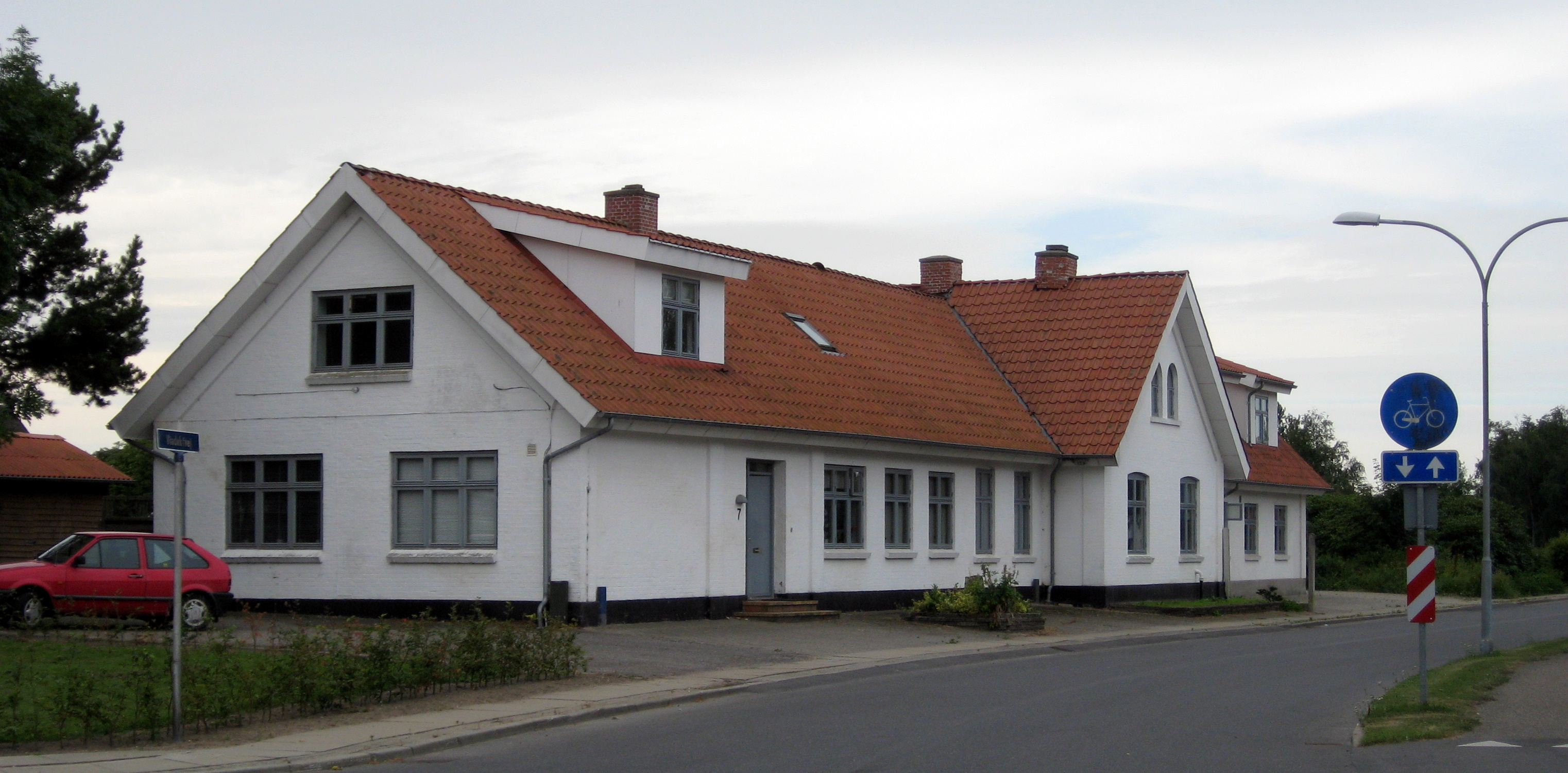 Gl. station i Aabybro (Hjørring-Løkken-Aabybro Jernbane)